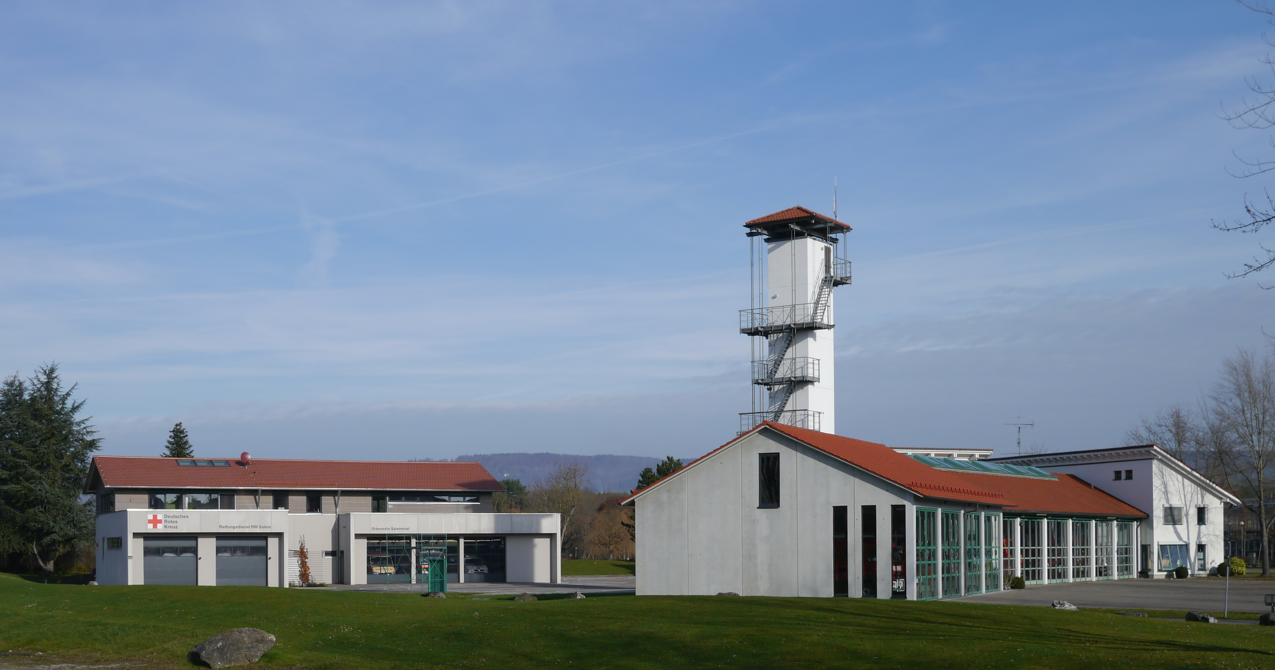 Die Gebäude der Freiwilligen Feuerwehr (rechts, im Vordergrund) und des Deutschen Roten Kreuzes (links, im Hintergrund) in der Gemeinde Salem